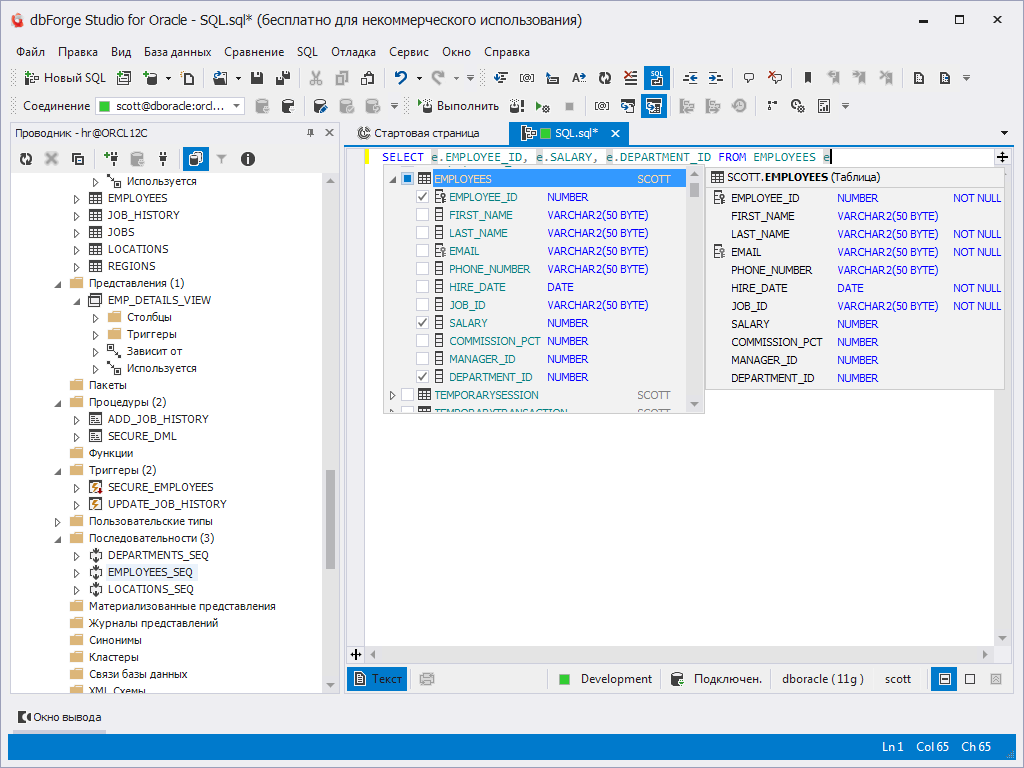 потужне середовище розробки і адміністрування баз даних Oracle, яка дозволить істотно прискорити написання PL / SQL коду.